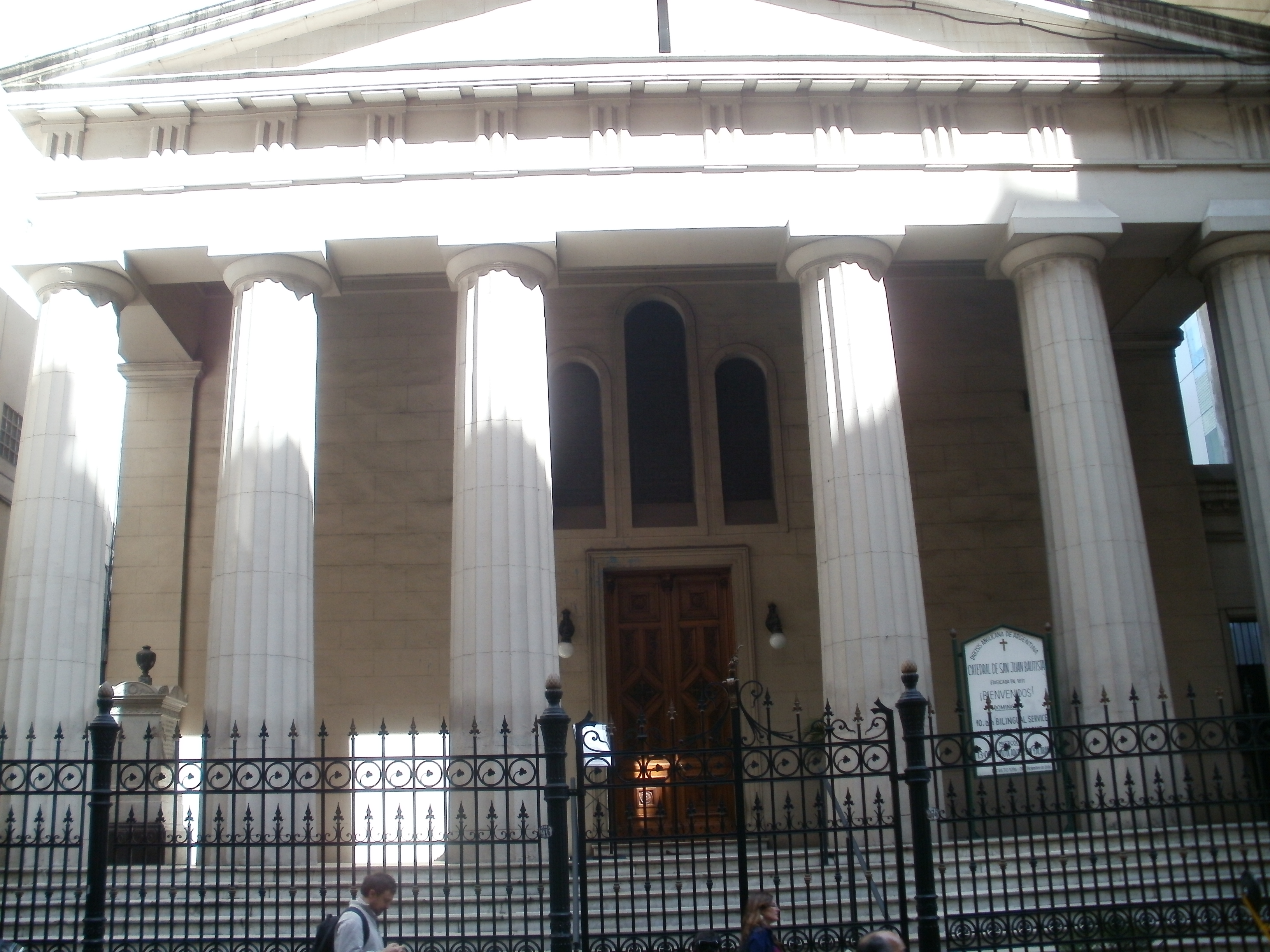 ubicada sobre la calle 25 de mayo